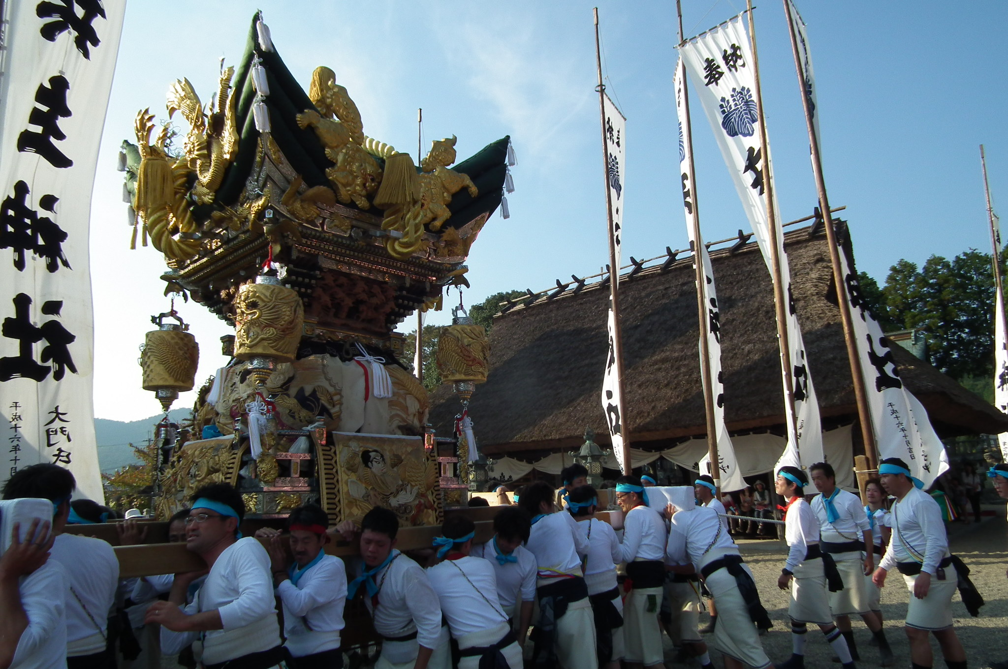 Hyozu-jinja 兵主神社例祭（西脇市黒田庄町岡）2011.10.9